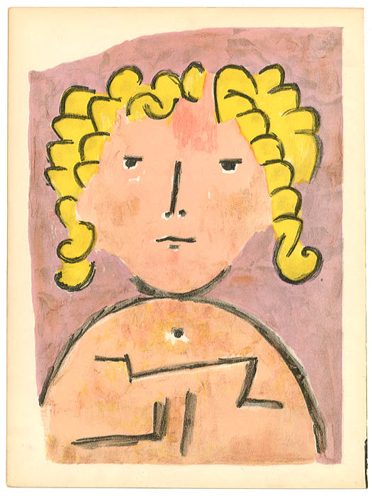 "Tête d'enfant" (Kopf eines Kindes). Farblithographie nach Paul Klee, 1939. Entwurf von Paul Klee; Übertragung auf den Stein durch Mourlot Frères (Paris). Erschienen in der Zeitschrift "Verve. Revue artistique et littéraire", Vol. II, Nos. 5/6, 1939. Blattgröße : 35,5 × 26,5 cm